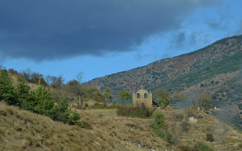 Ermita de la Mare de Déu del Soler (Sort)